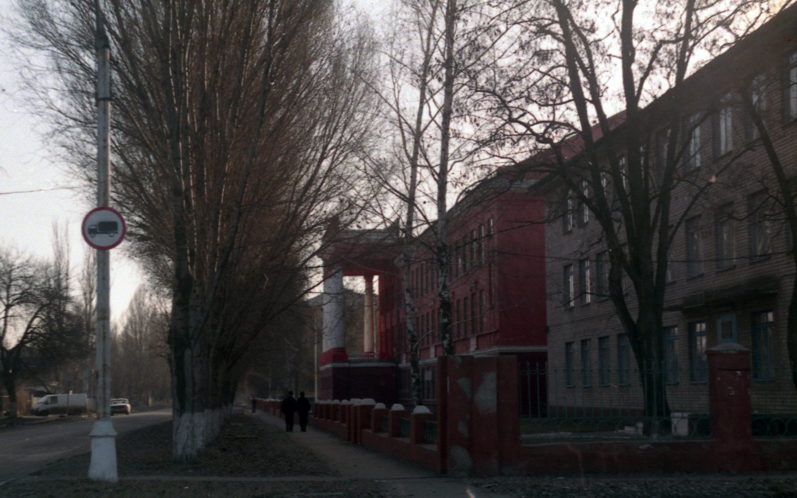 Машинобудівний коледж ДДМА (м. Краматорськ): Машинобудівний коледж ДДМА (м. Краматорськ)